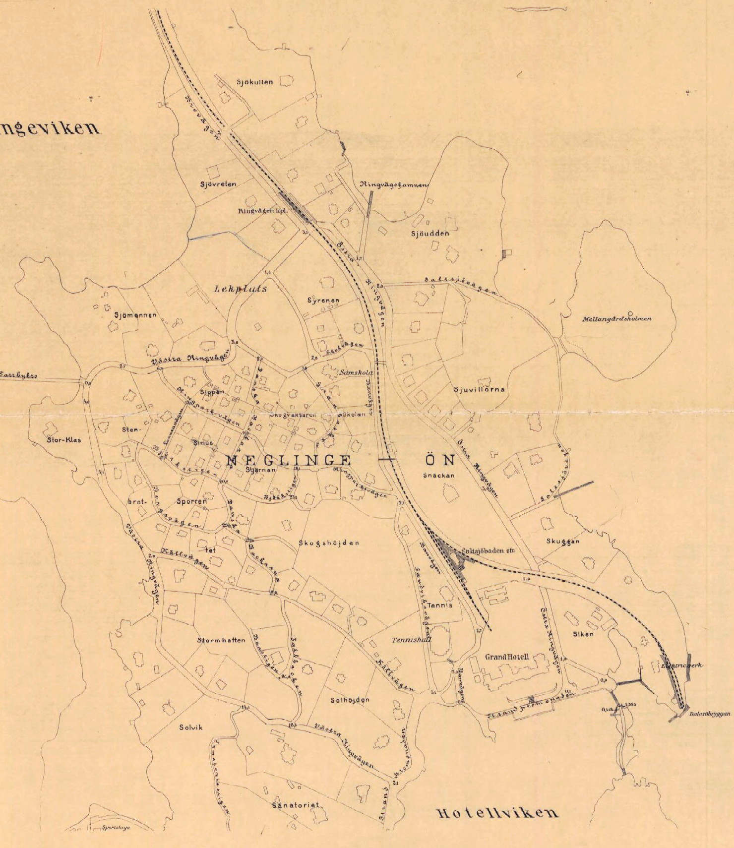 Stadsplan för Neglingeön upprättad av arkitekt Per Olof Hallman